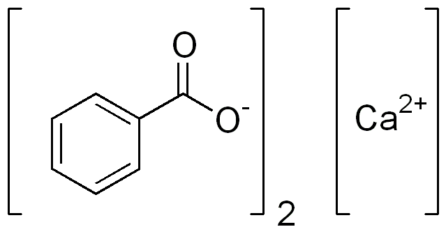 Chemical structure of Calcium benzoate.